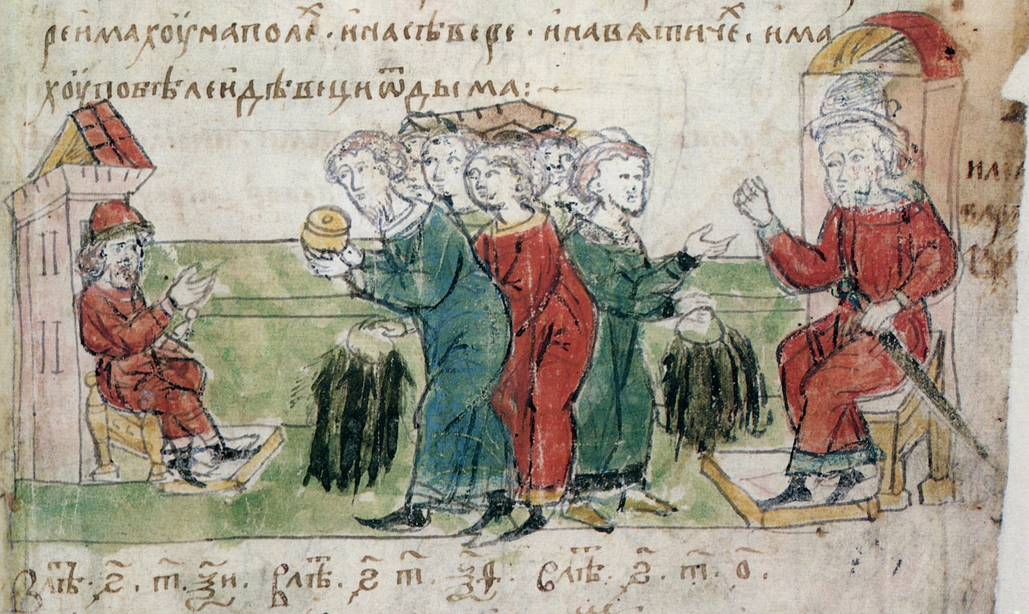 Радзивилловская летопись, л. 8r, детайл. Миниатюра: Плата дани славянами (кривичами) и чюдью – варягам, а полянами, северянами и вятичами – хазарам; размер дани – белка и девица от дыма (внизу) Tекст из Радзивиловской летописи: "... Имаху дань варязи из замория в чюди, на словенех, на мерях, и на всех кривичех. А козаре имаху на полех, и на севере, и на вятичех, имаху по беле и девеци от дыма. ..." В других летописях - вместо 'девица', 'веверица'. Литература: Кукушкина: Радзивиловская летопись. Текст. Исследование. Описание миниатюр, стр. 305-306